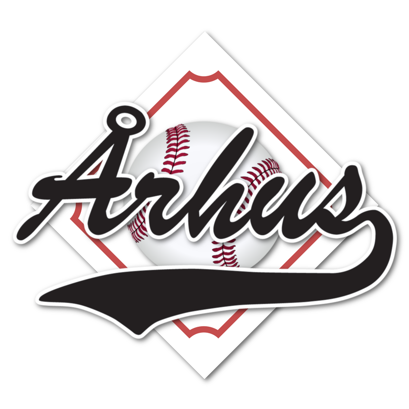 Århus Baseball Softball klubs logo